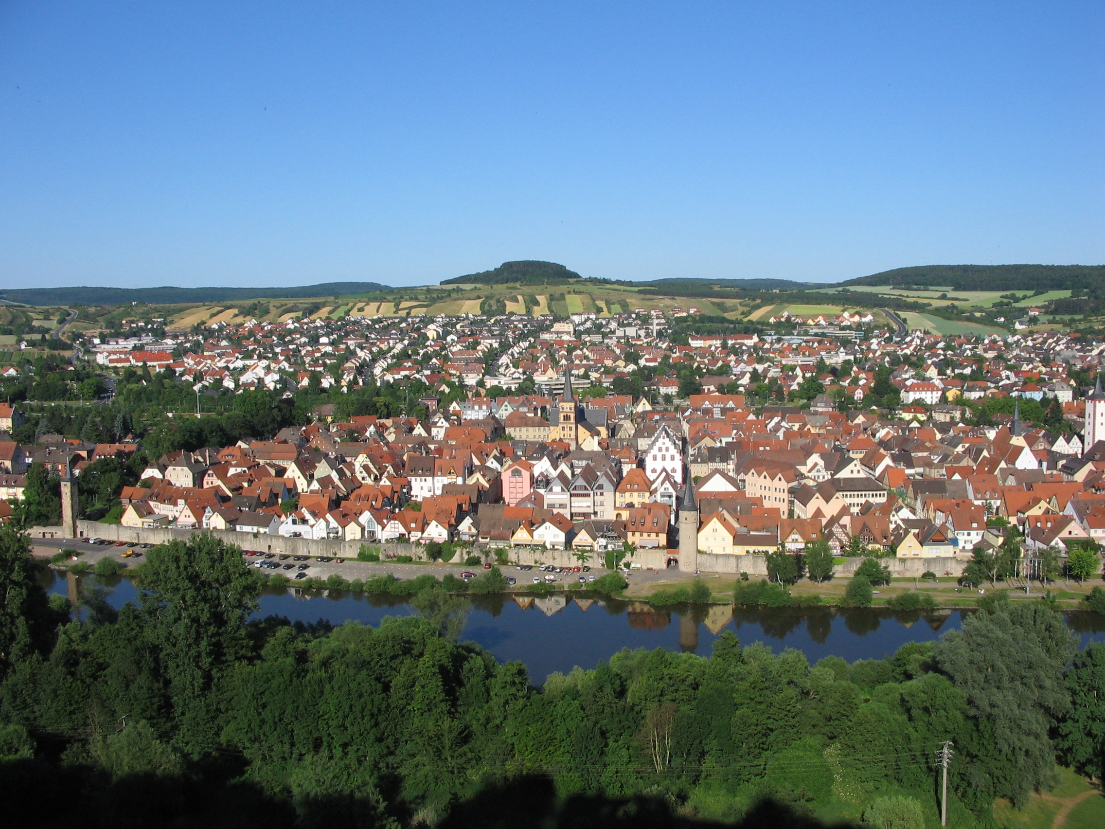 no original description, title: Karlstadt von der Karlsburg